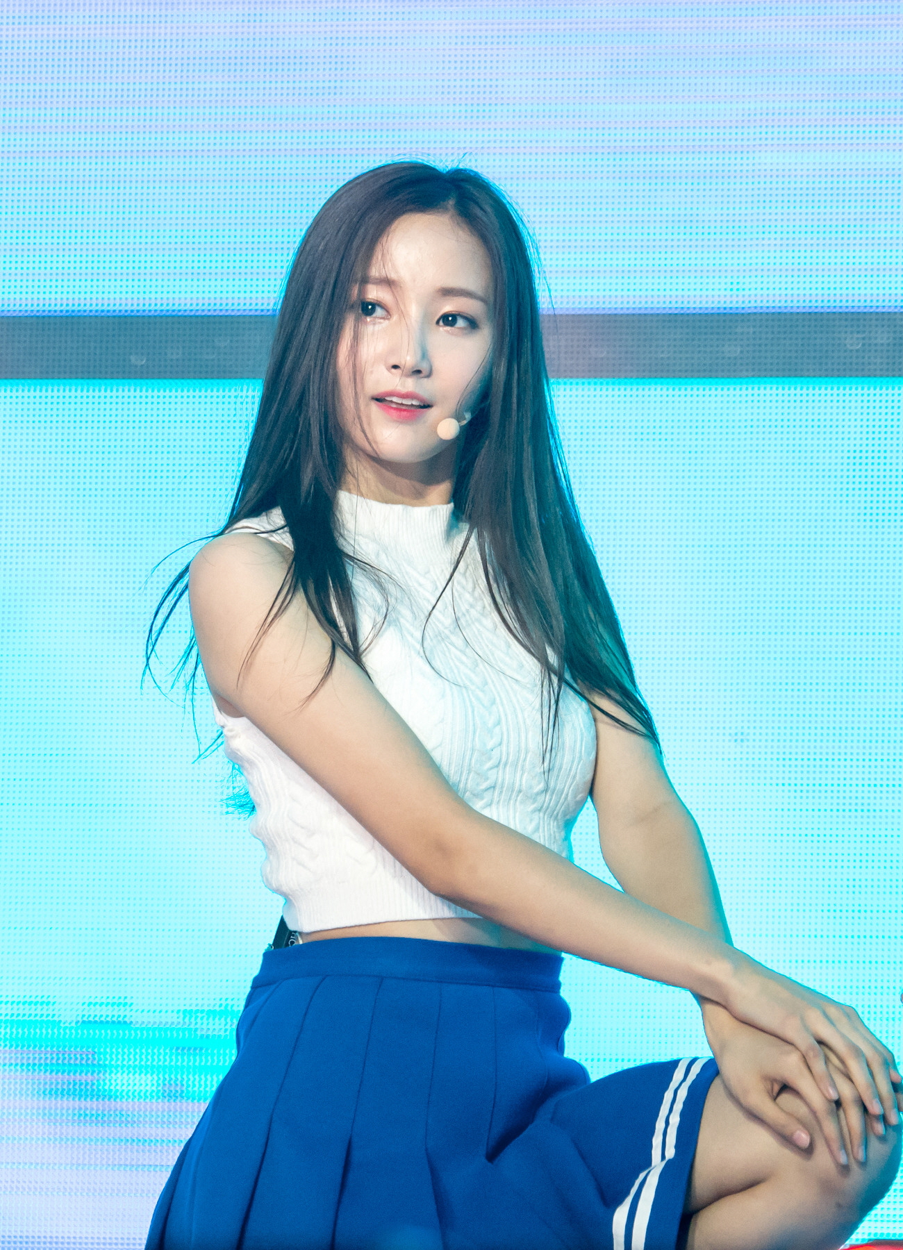 160903 모모랜드 파이널 연우